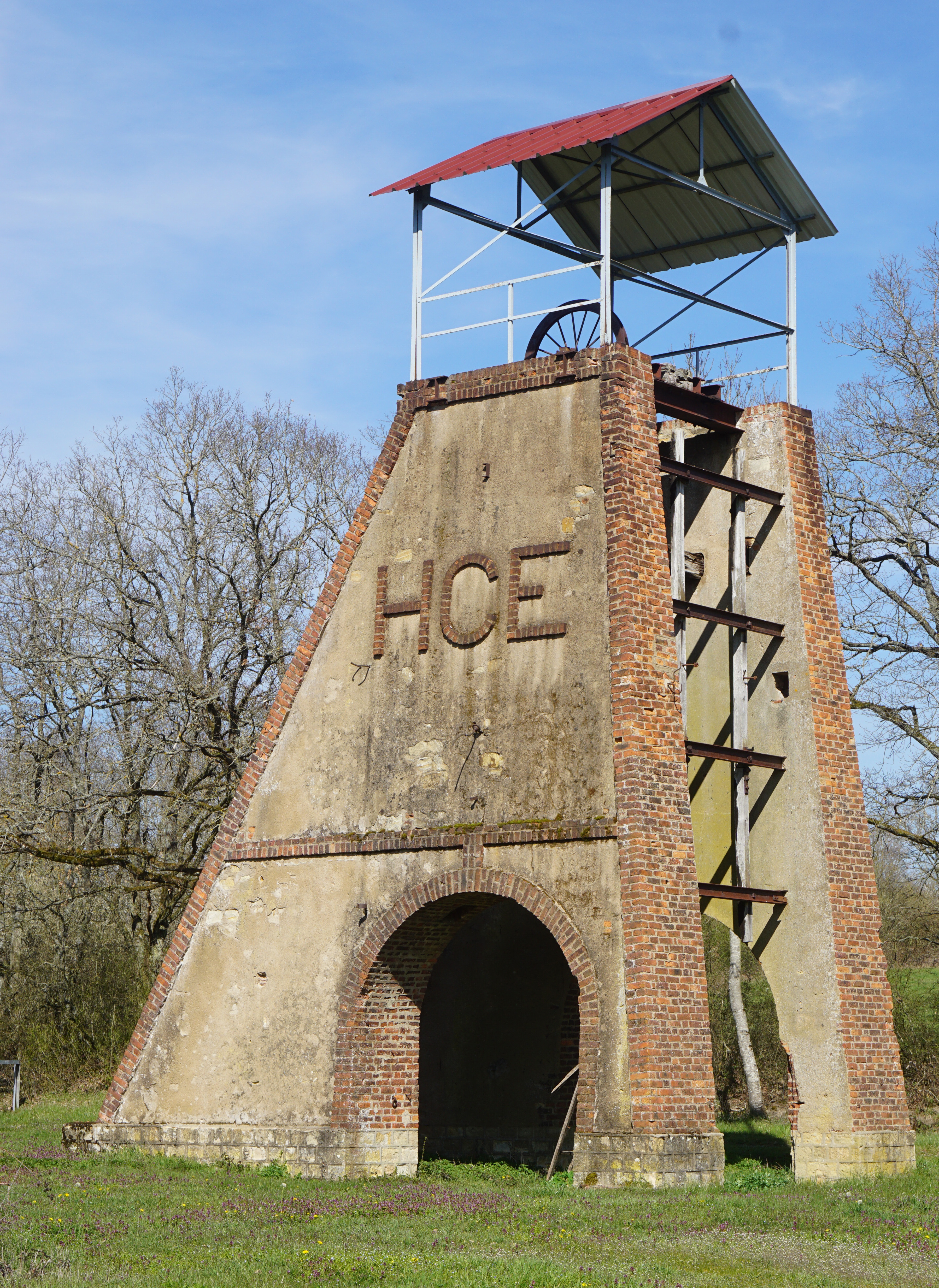 Le chevalement du puits des Fourneaux de la Compagnie des Houillères et Chemin de Fer d’Épinac. Charbonnage situé à Saint-Léger-du-Bois (Saône-et-Loire).